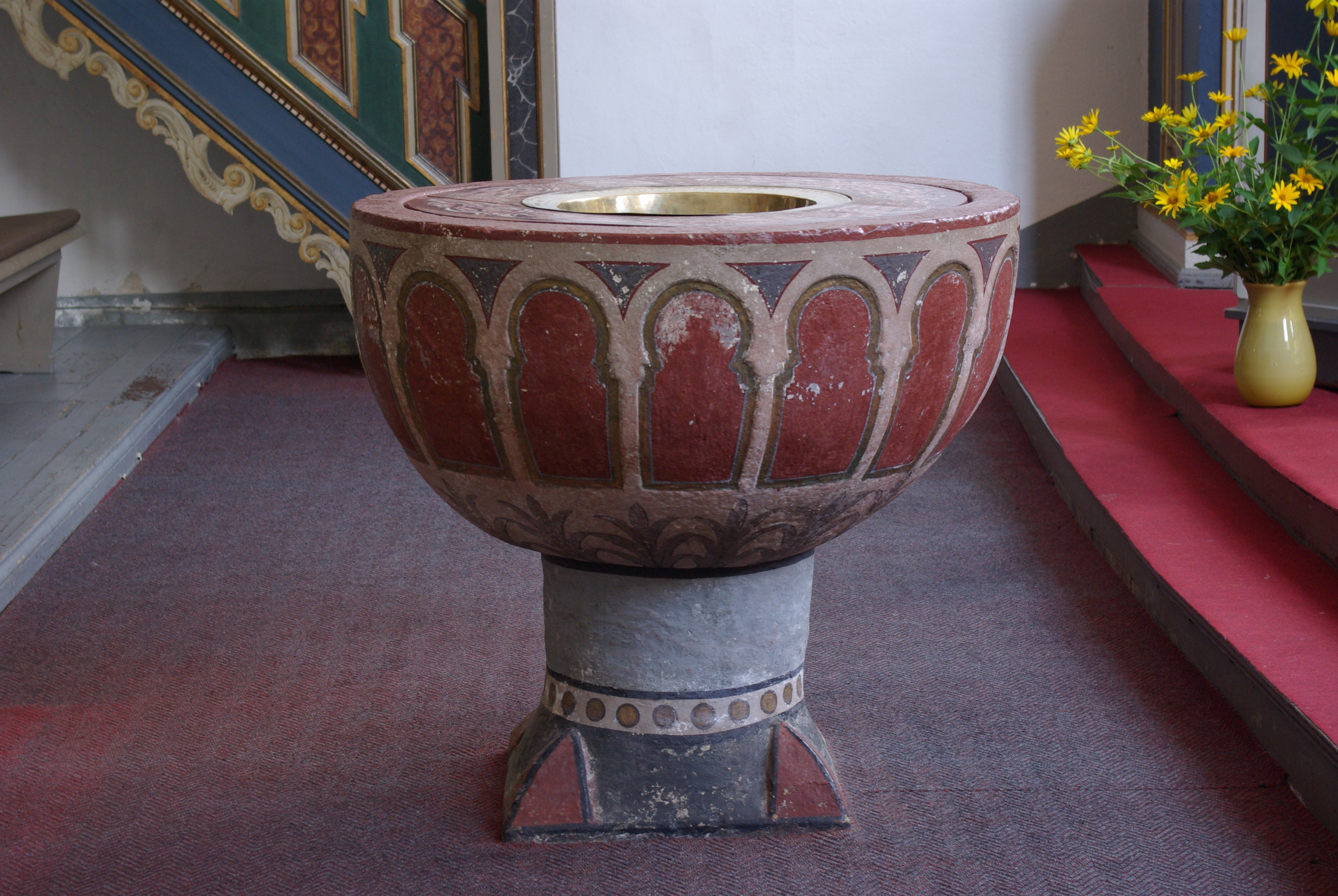 Bad Freienwalde in Brandenburg. Der Taufstein stammt aus dem 13. Jahrhundert. Die Farbgestaltung ist wahrscheinlich im 18. Jahrhundert hinzugefügt worden.